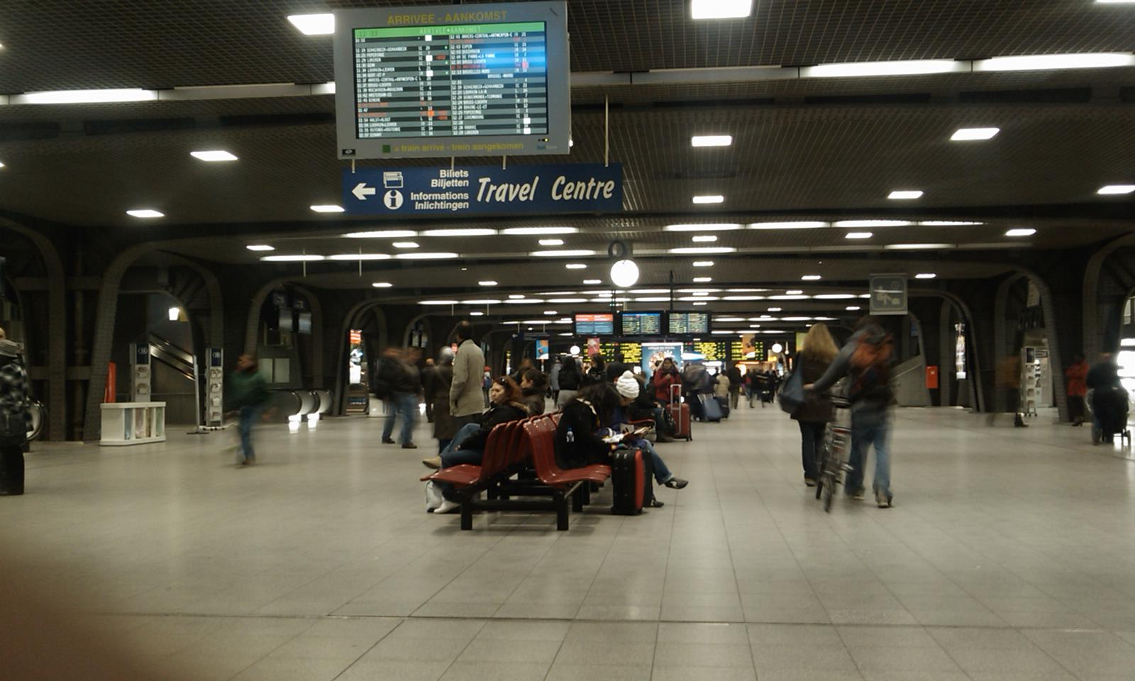 Gare de Bruxelles-Midi - Station Brussel-Zuid